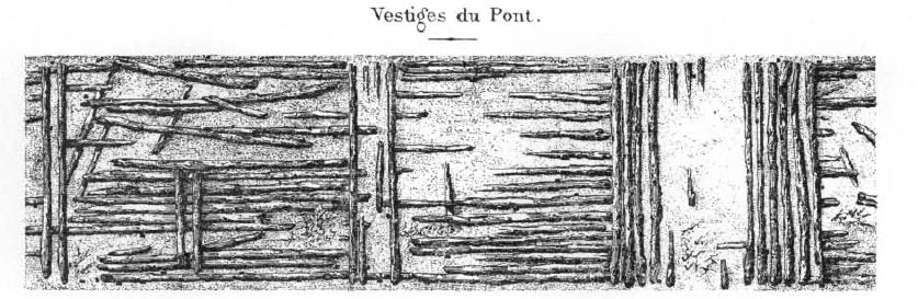 Pont romain à fascines - d'après un dessin de L. Plessier